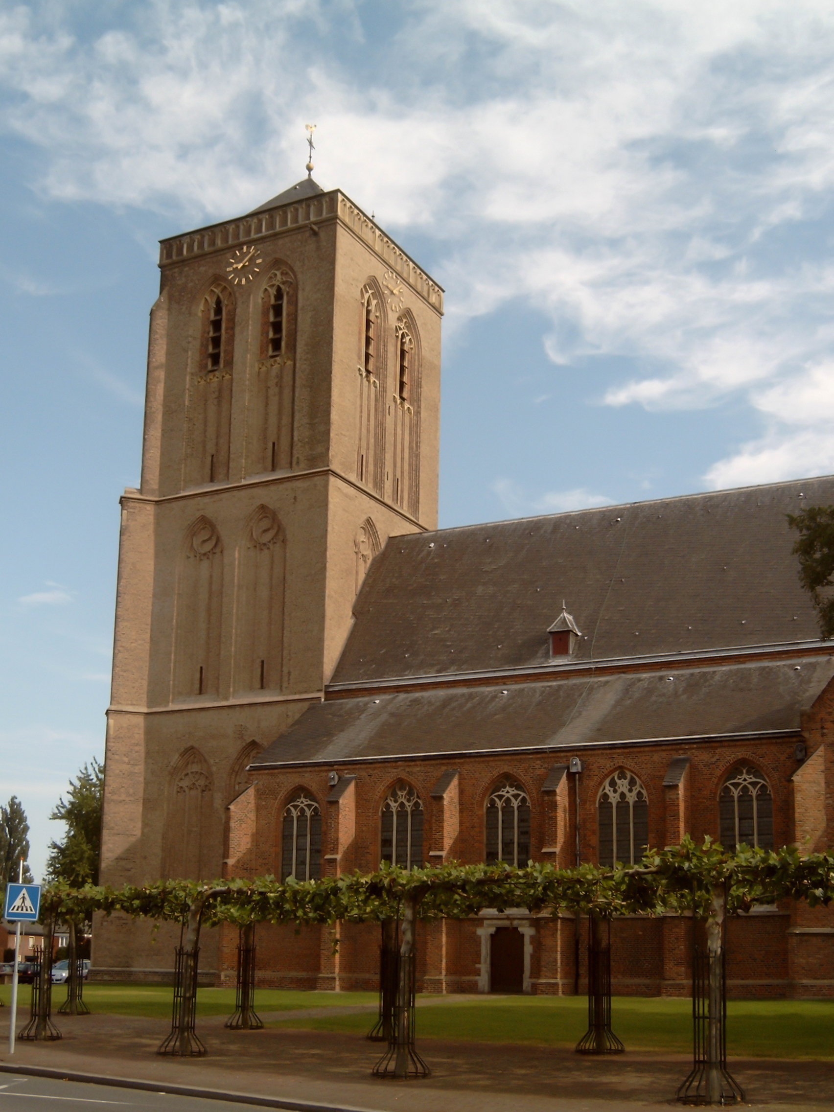 Didam, kerk